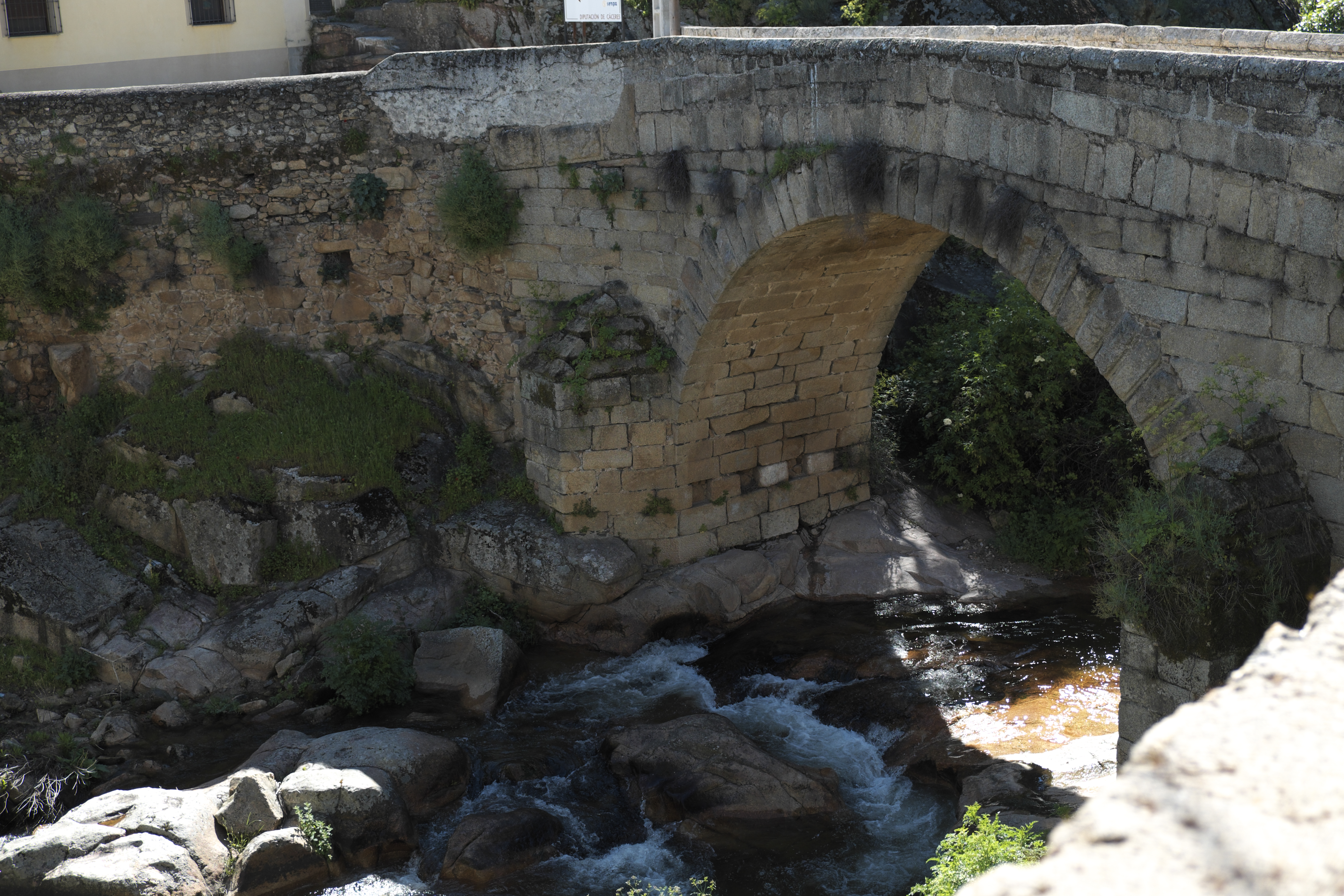 Barrio judío-gótico (Judenviertel) in Valencia de Alcántara in der Provinz Cáceres (Extremadura/Spanien), römische Brücke